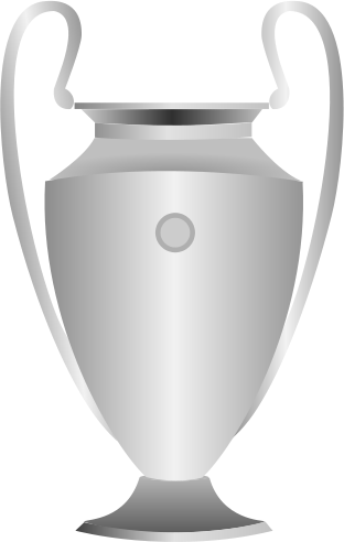 Coupe de la Ligue des Champions